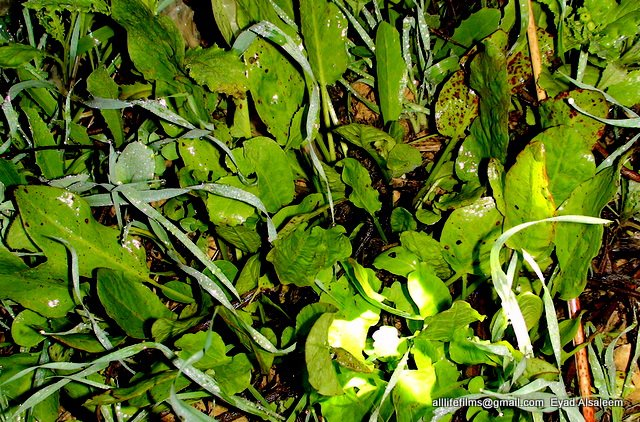 نباتات برّية سورية تؤكل